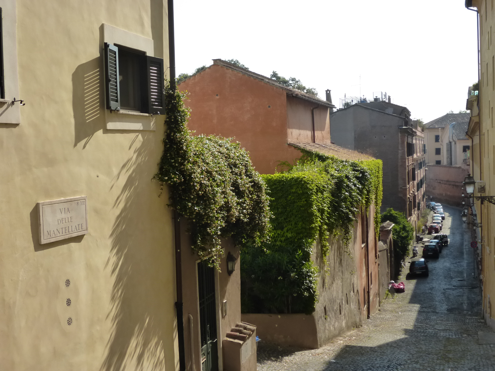 Roma, via delle Mantellate verso via della Lungara. Sulla destra il muro di cinta, e in fondo i bracci, del carcere di Regina Coeli.